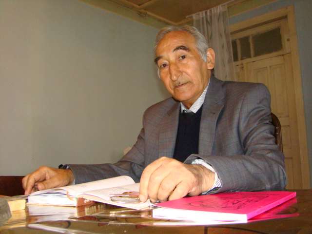 Sərraf Şiruyə (Hacıyev Şiruyə Həsən oğlu) — Azərbaycan şairi, Azərbaycan Yazıçılar Birliyinin (2005) və Azərbaycan Jurnalistlər Birliyinin (2005) üzvü.